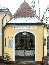 Kapelle des Hochgerichts Altschloss Purgstall, Niederösterreich